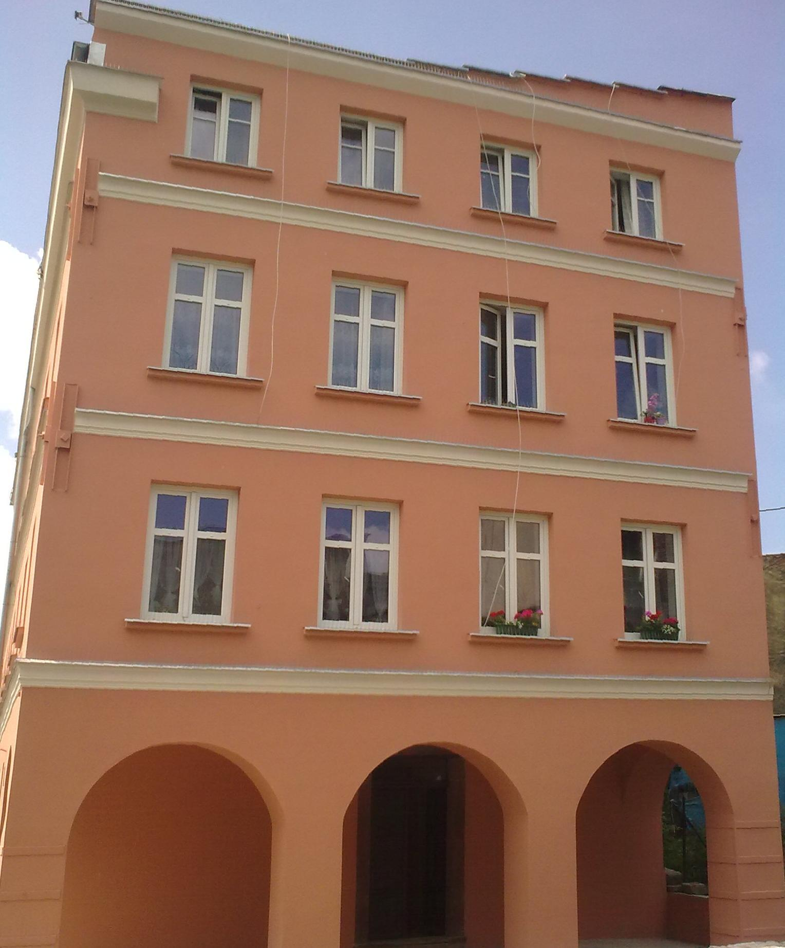 Nowa Ruda, ul. Łukowa 10 - dom, pocz. XIX